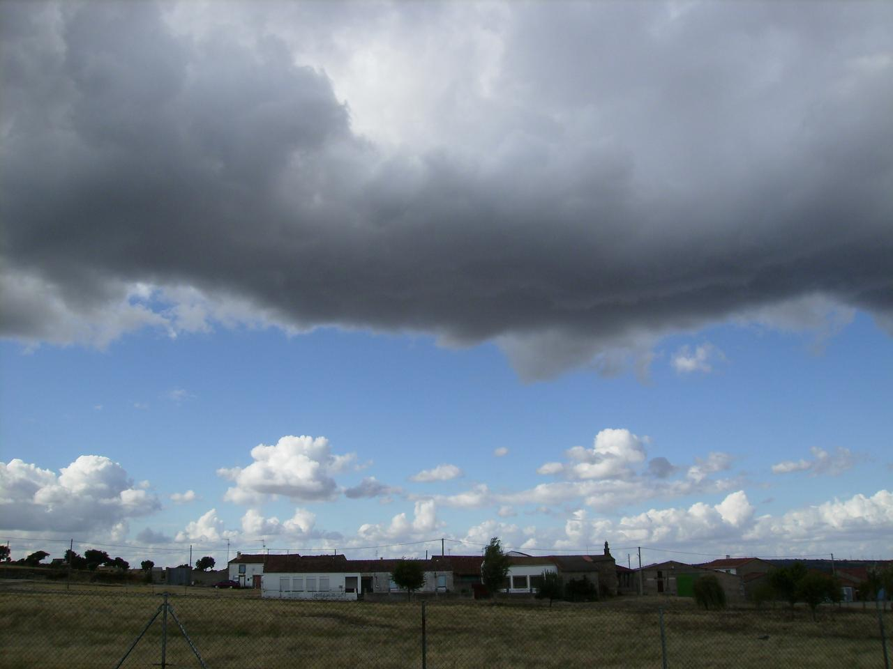 El Egido (La Peña)